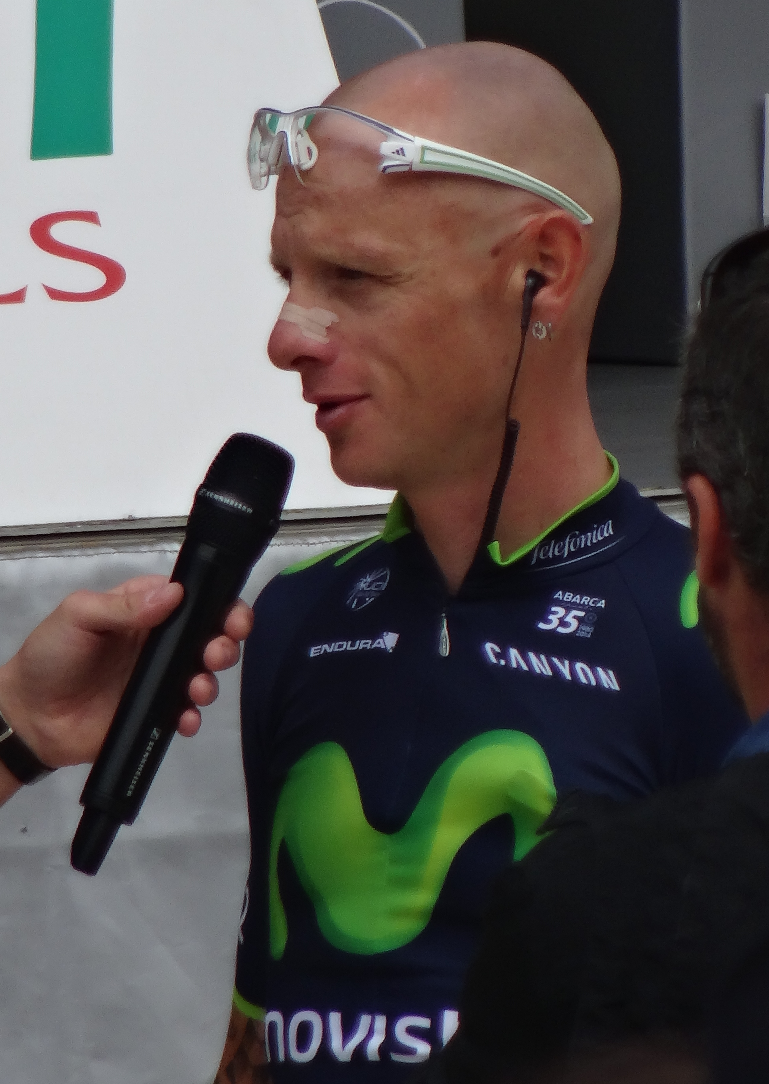 Reportage photographique réalisé le mardi 8 juillet à l'occasion du départ de la quatrième étape du Tour de France 2014 au Touquet-Paris-Plage, Nord-Pas-de-Calais, France.